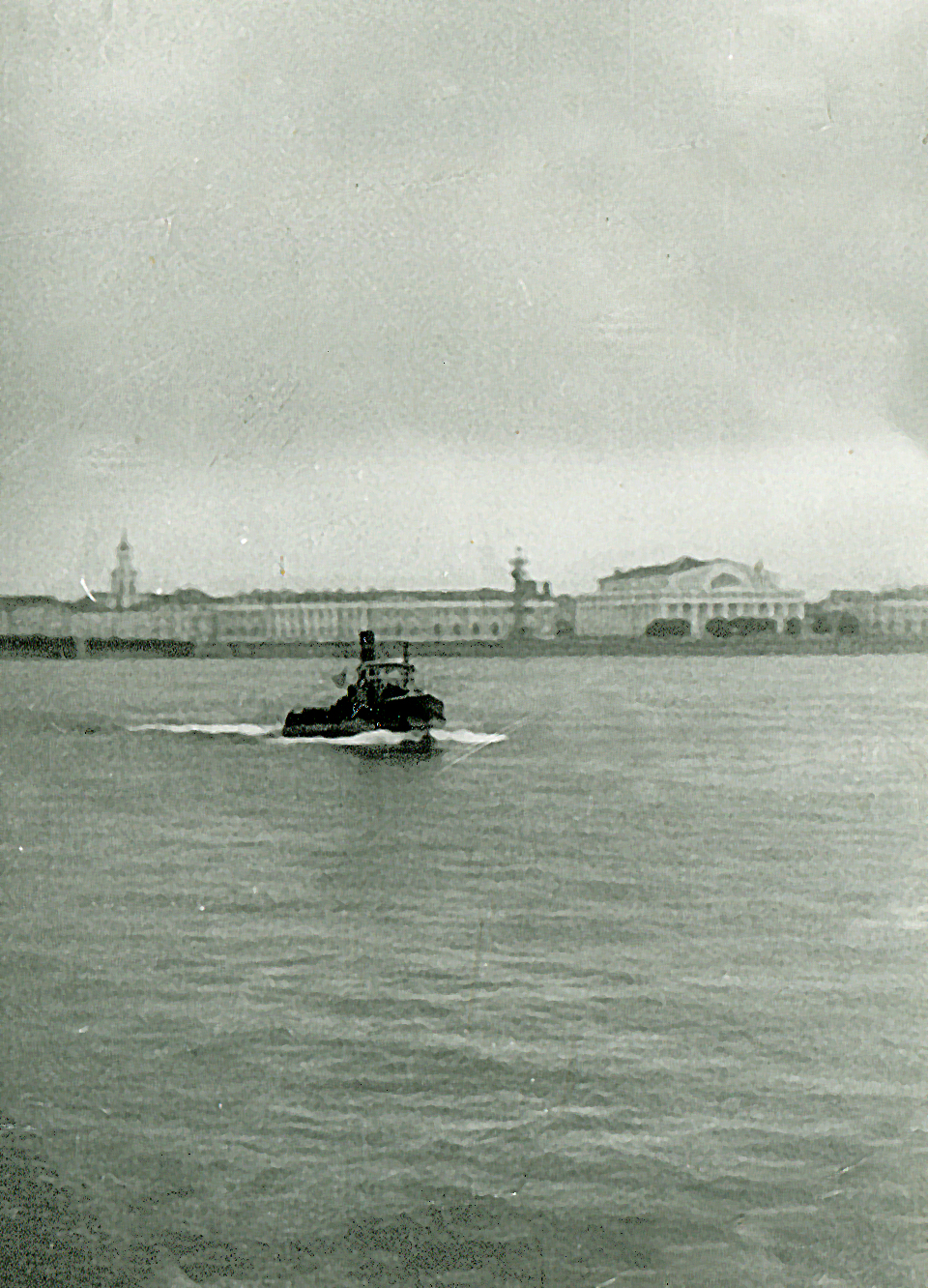 Паровой буксир на Неве